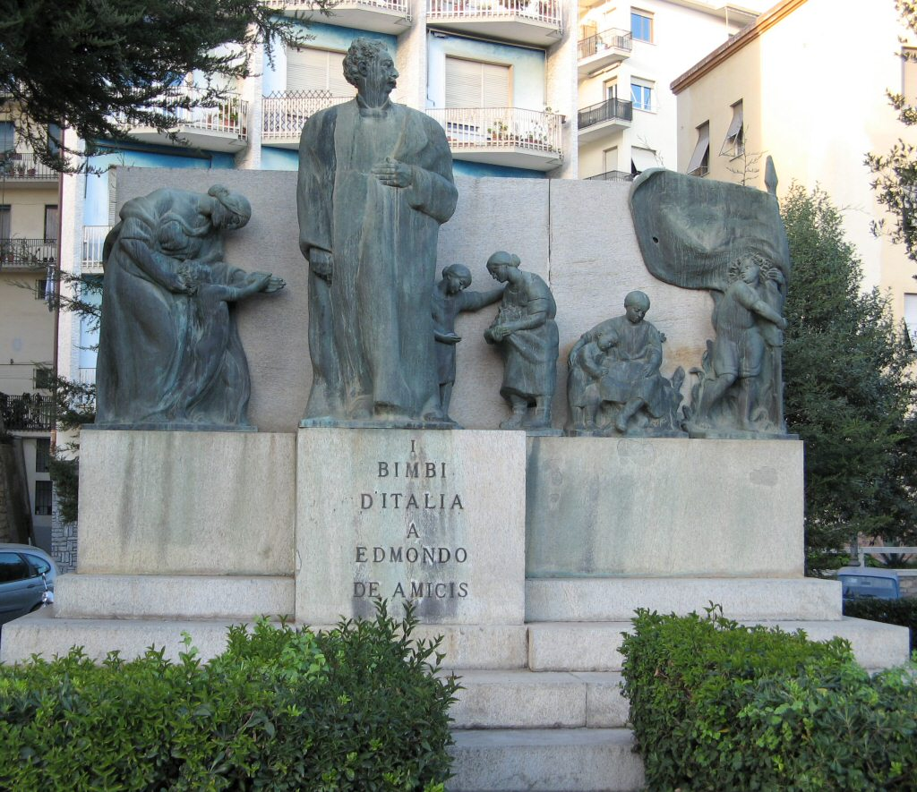 Monumento a Edmondo DeAmicis, Imperia, Italy